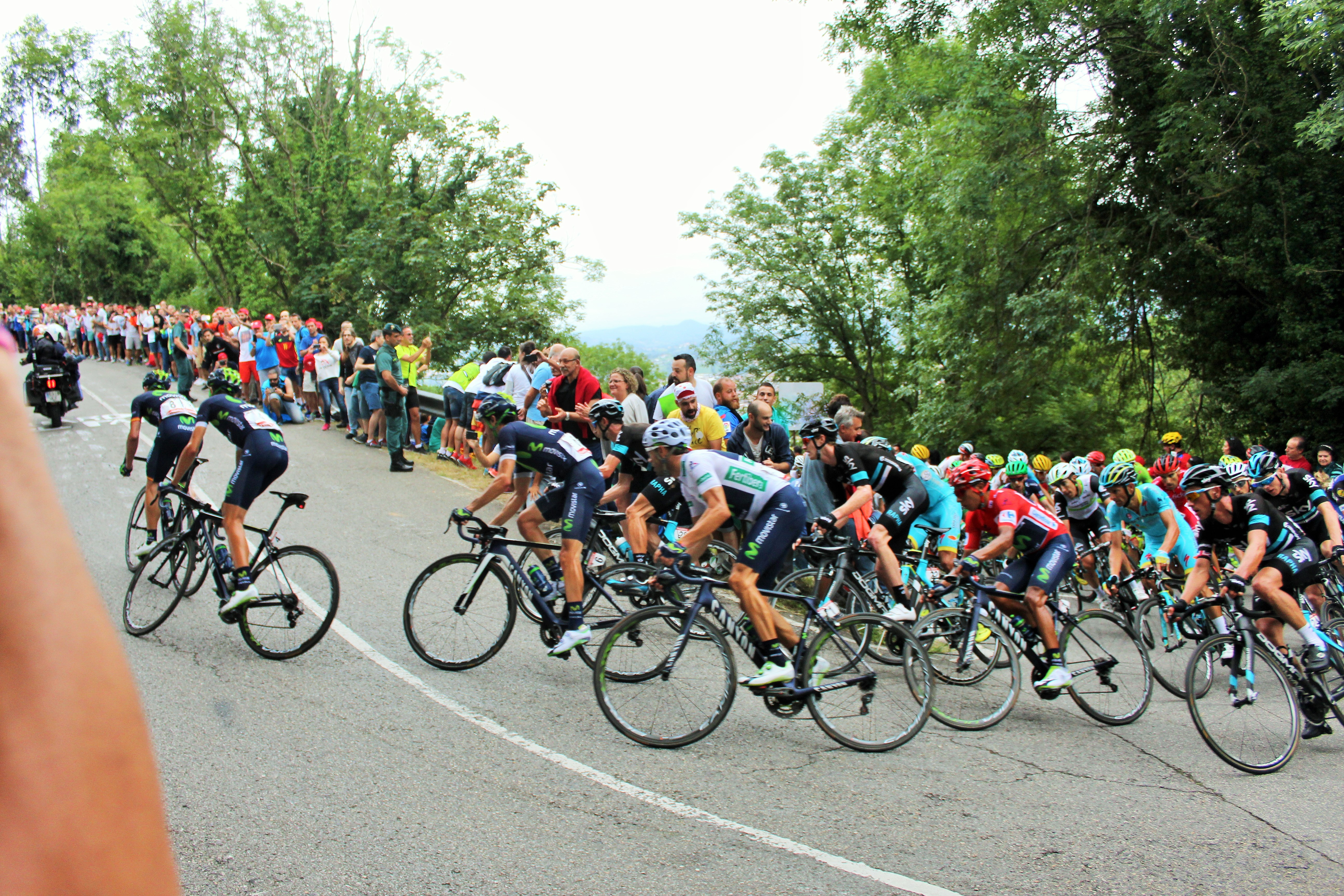 San Miguel de Lillo. Pelotón de Contador.